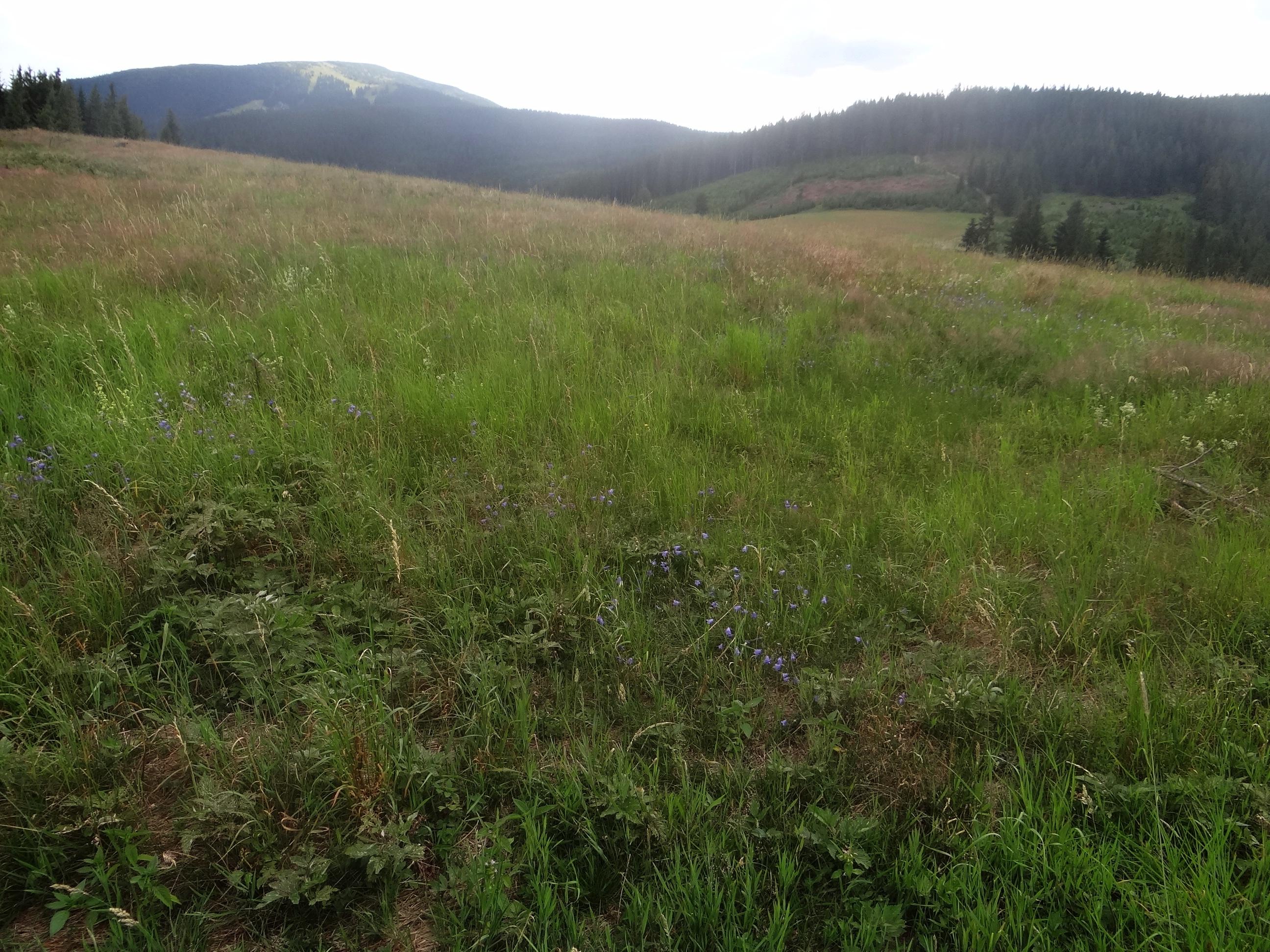 Hala Malorka w Beskidzie Żywieckim i widok na Pilsko